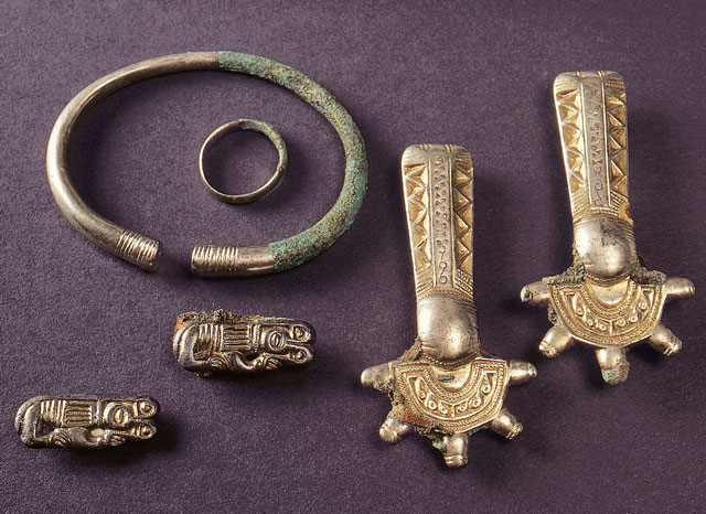 Schmuck- / Trachtbestandteile der germanischen Dame aus Grab 4 von Basel - St. Albangraben 5+7, 1999/6.